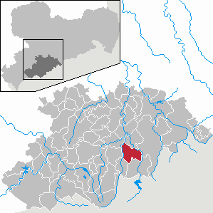 Mildenau im Erzgebirgskreis, Sachsen